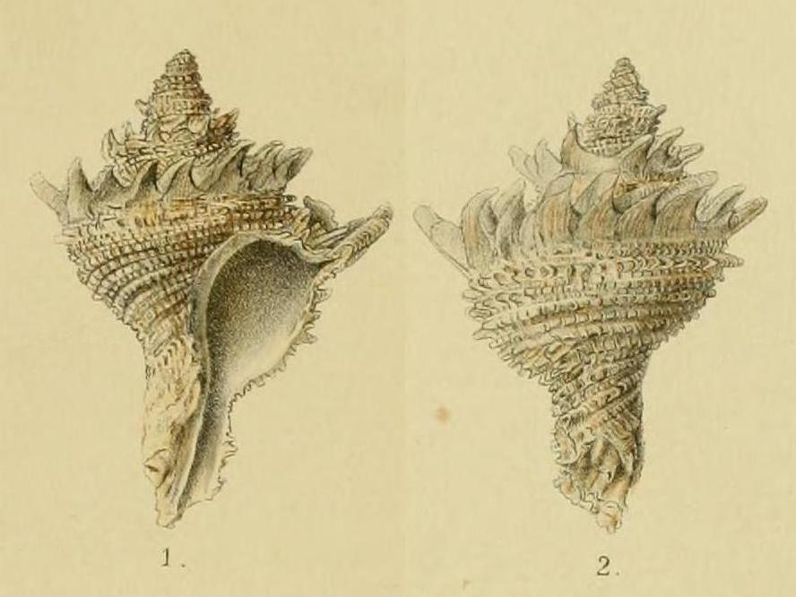 カセンガイ 'Babelomurex lischkeanus' (Dunker, 1882) , タイプの図 --Dunker, 1882より。（Rapana lischkeana Dkr. -- Dunker, 1882, Pl. 1, Figs. 1-2.）